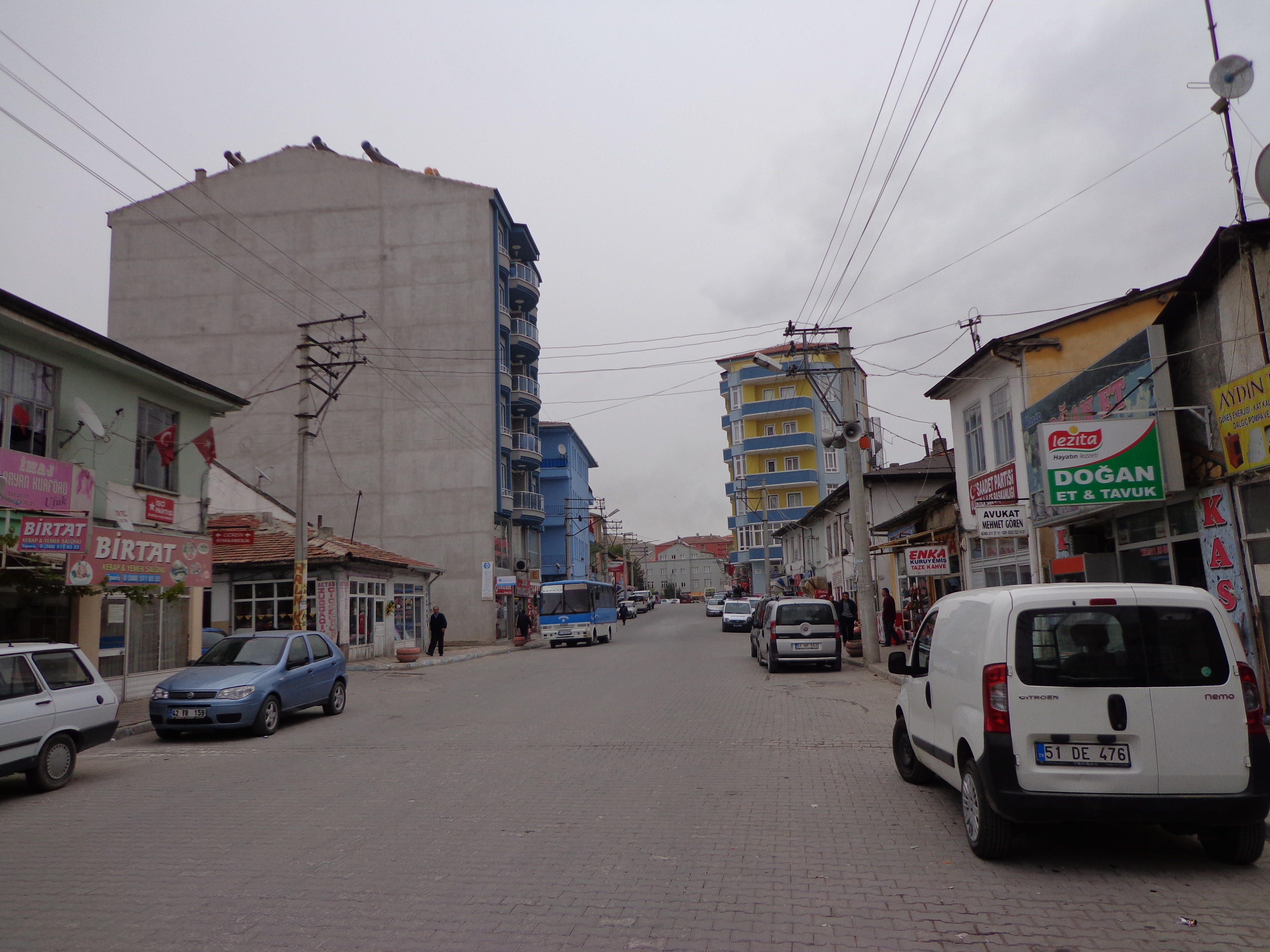 niğde ulukışla ilçesi